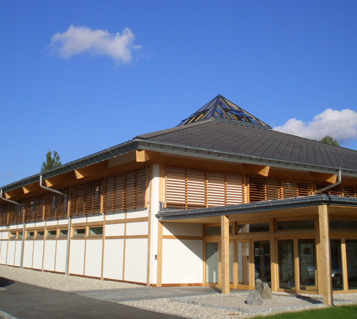 Budokan, ein Veranstaltungsort für Kampfsportarten in Wels